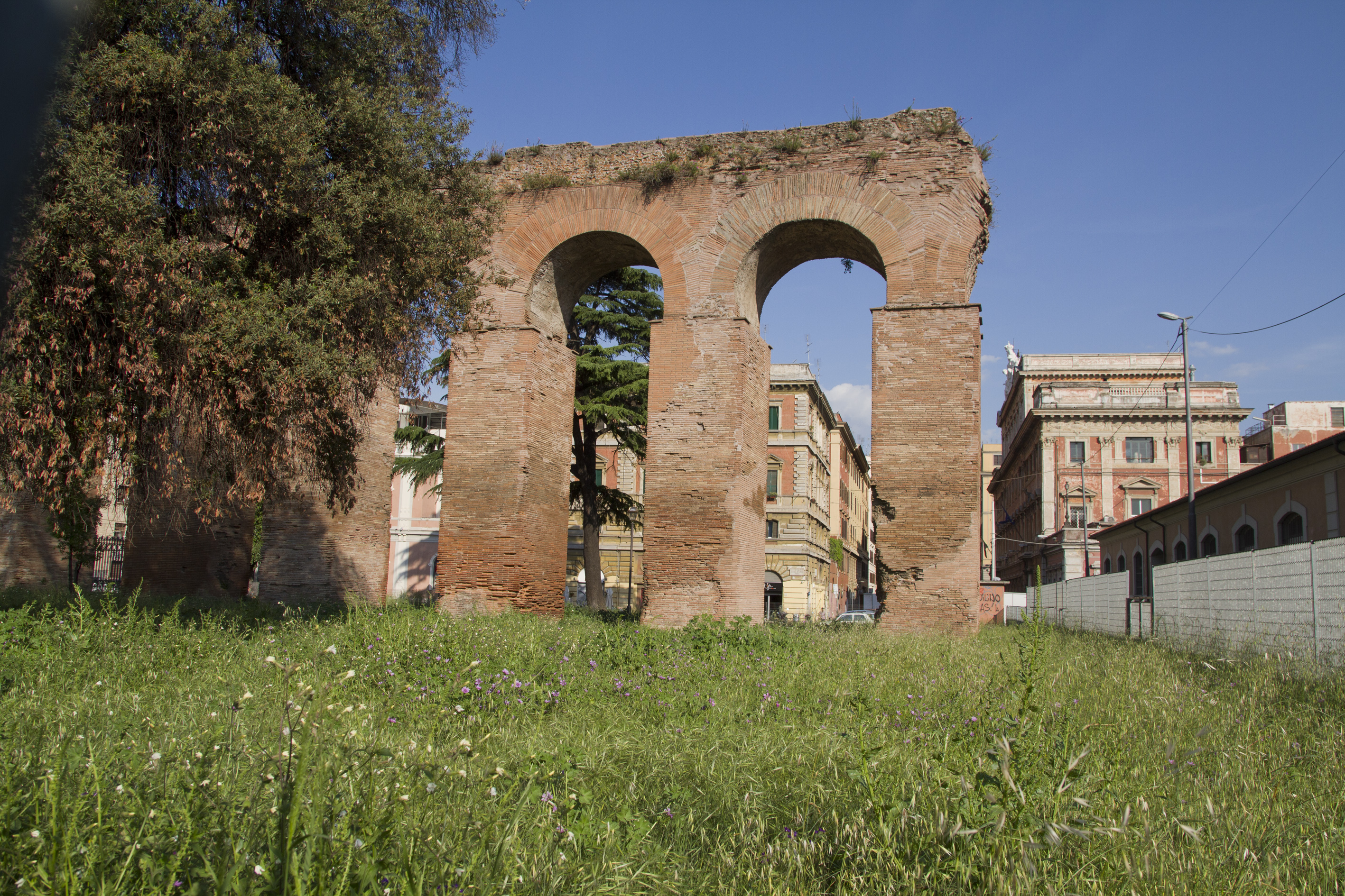 Acqua Marcia, Rione XV Esquilino, Roma, Lazio, Italy